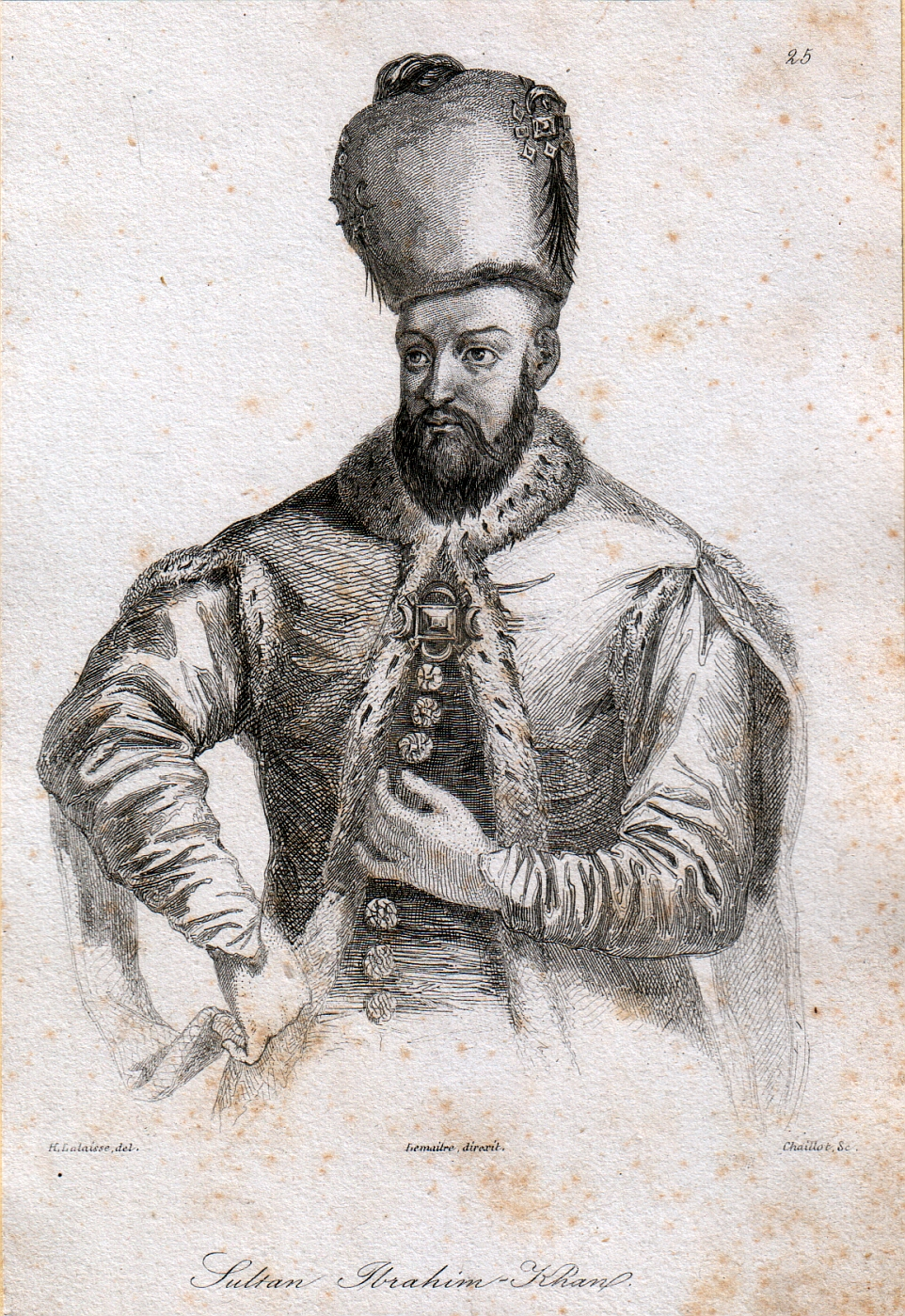 YSultan Ibrahim Khan. Lemaitre, direxit